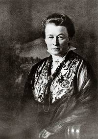 Ellen Ammann (1870-1932); Foto um 1920